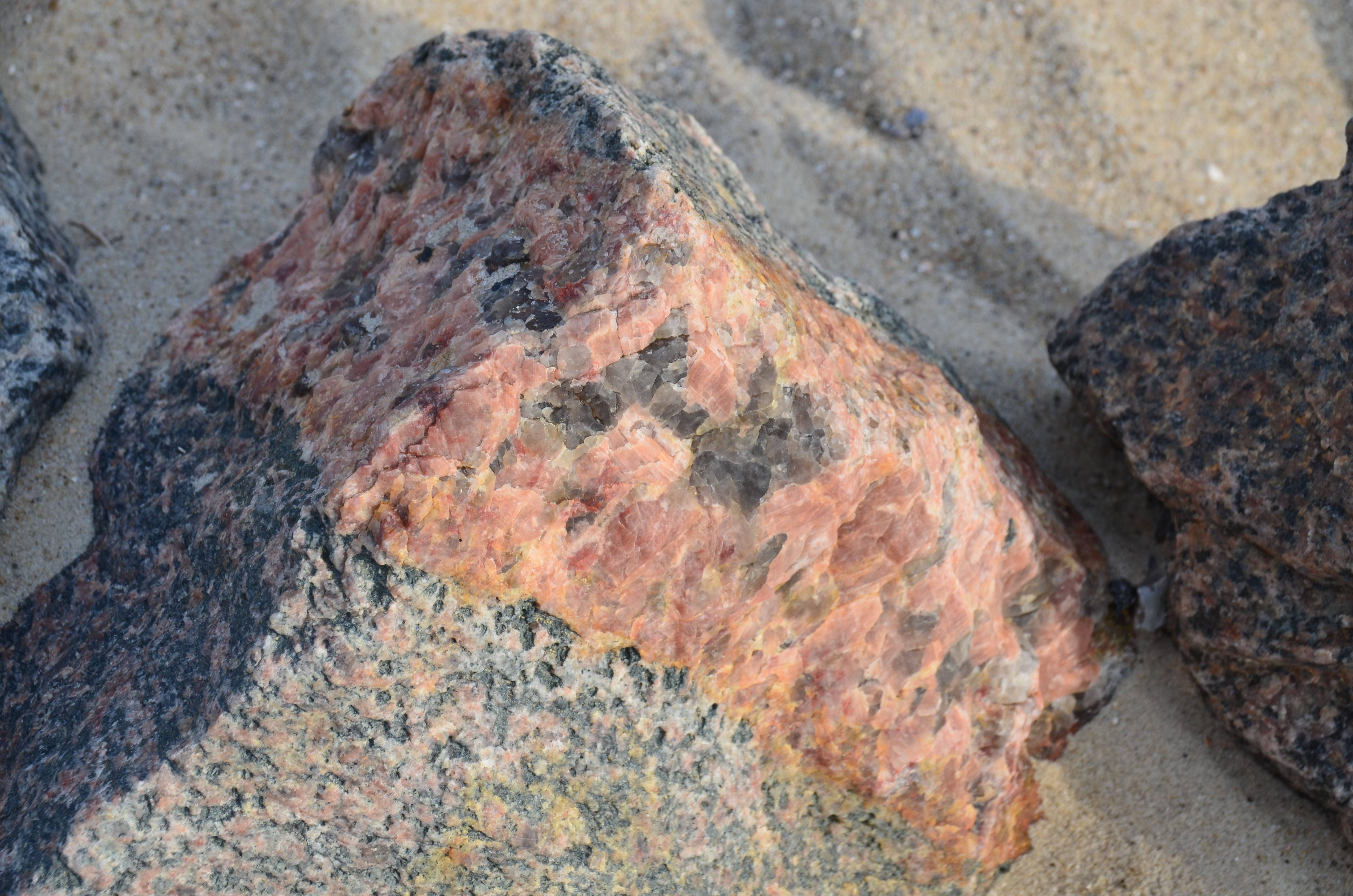 Pegmatitgang (Granit mit grobkristallinem Quarz und Kalifeldspat als Hauptbestandteilen) in einem Stein der Uferbefestigung am Strand von Utersum auf Föhr